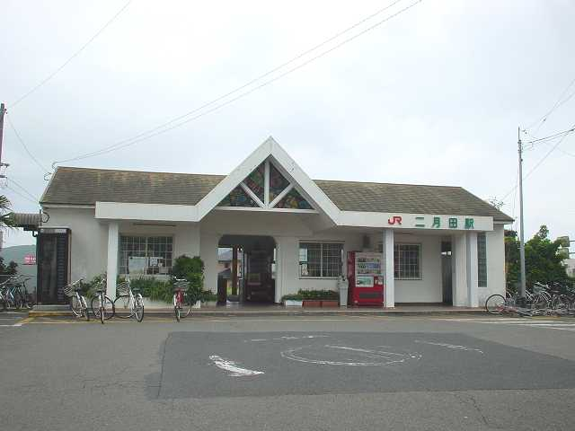 二月田駅（2005年7月投稿者が撮影）